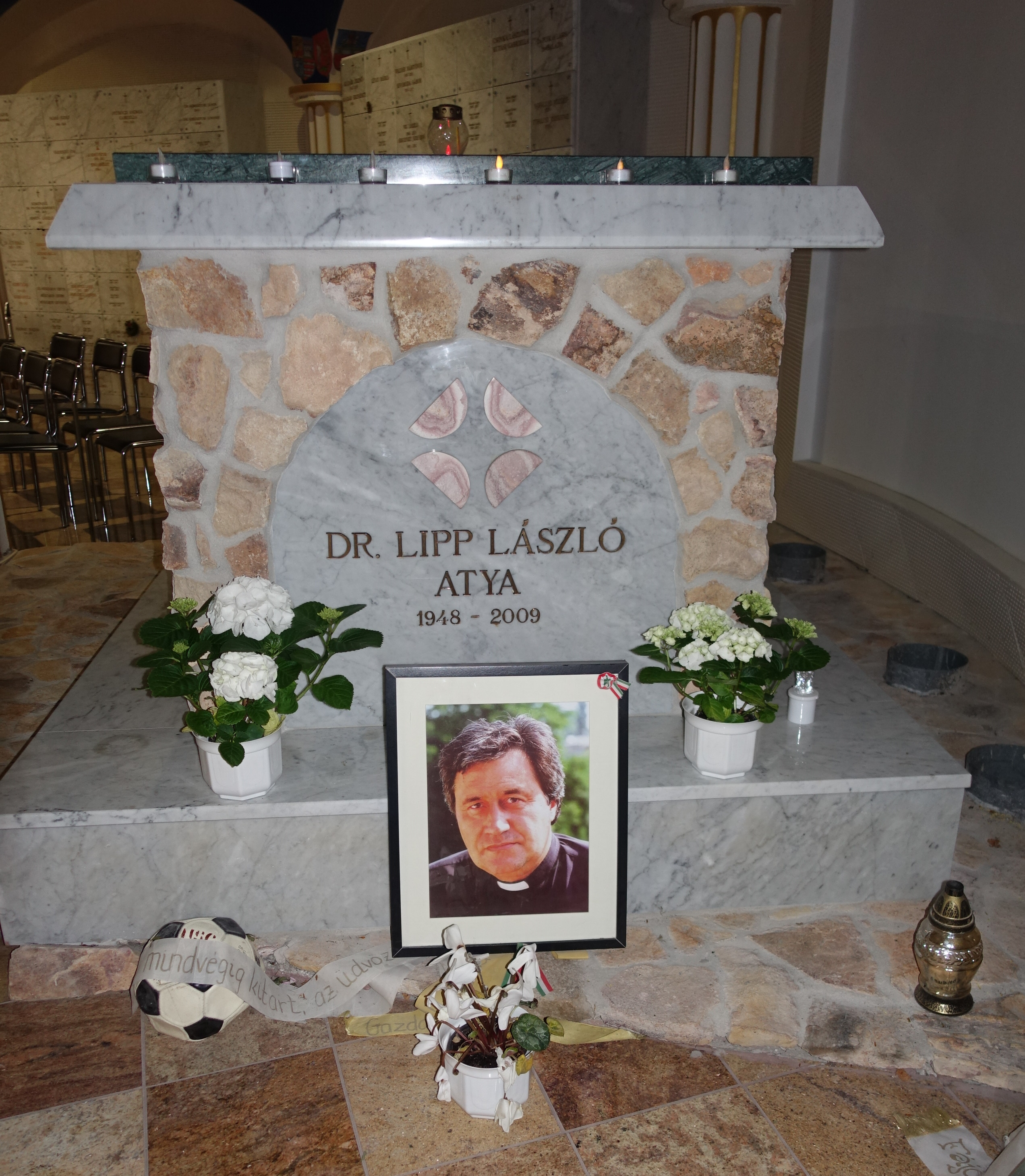 Szent Angyalok-templom, Lipp László atya sírja az altemplomban